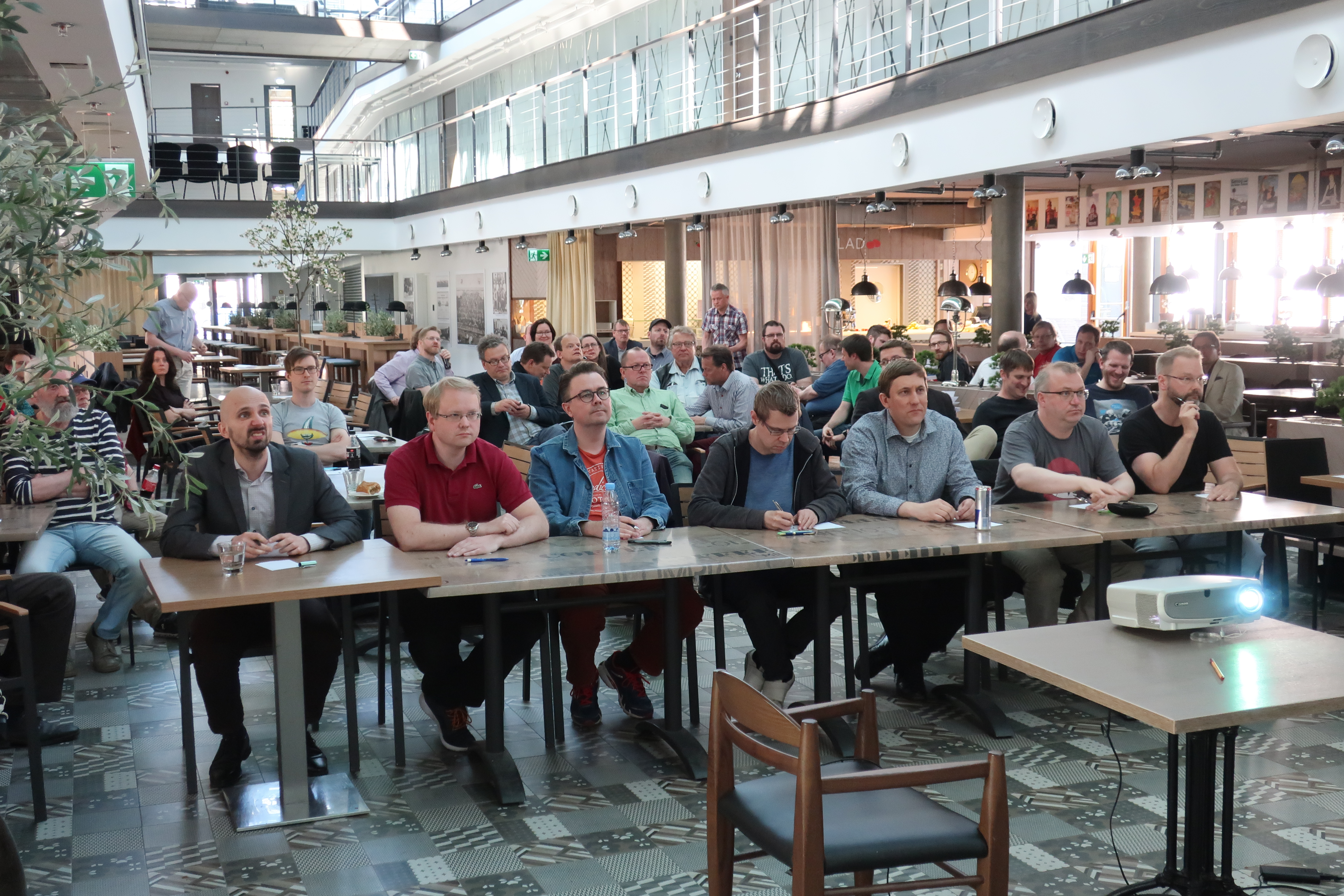 Tietokilpailun Pohjoismaiden-mestaruuskilpailut Tallinnassa 2018, henkilökohtaisen kilpailun finaali. Eturivissä finalistit vasemmalta Igor Habal, Lars Heggland, Thomas Kolåsæter, Tero Kalliolevo, Ove Põder, Ole Martin Halck ja Tore Dahl.